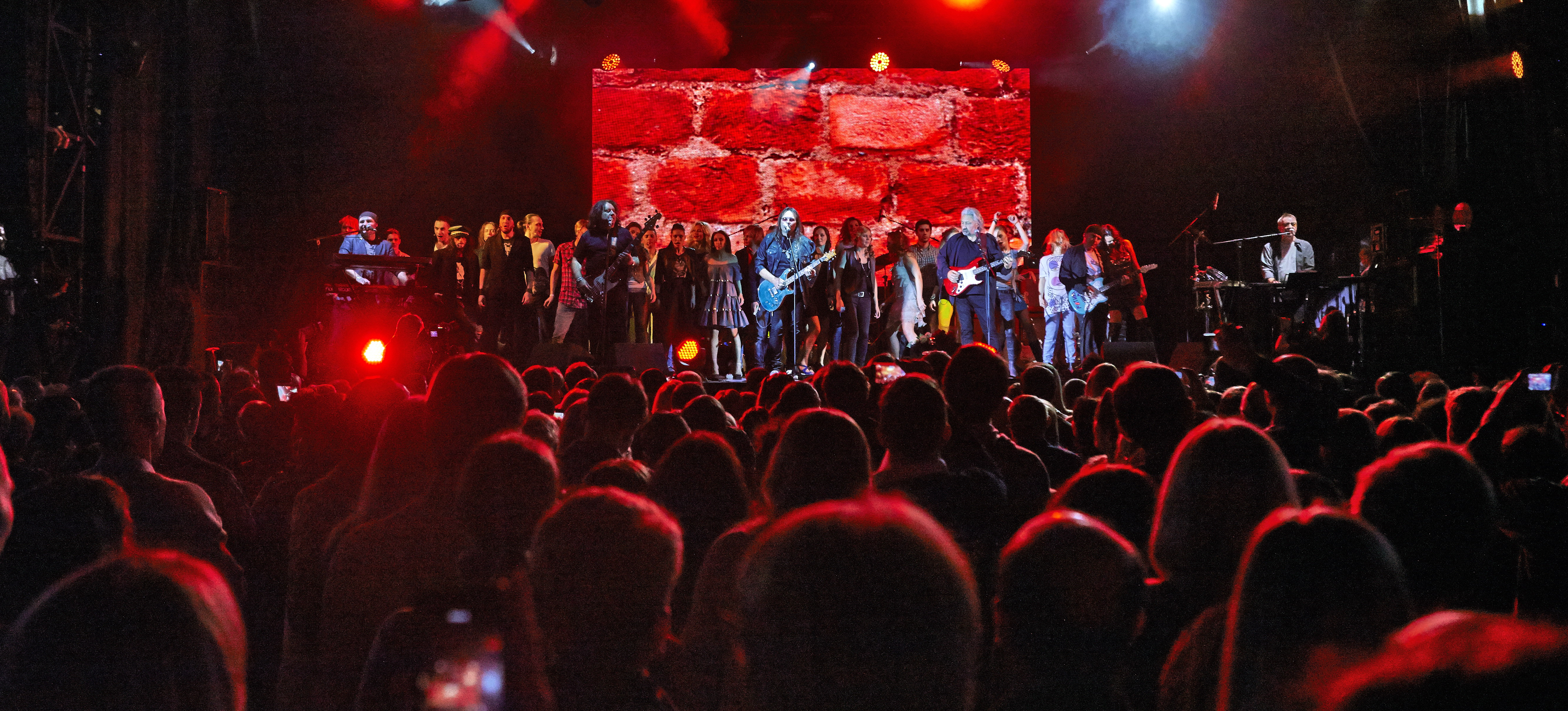 Культовая песня группы Pink Floyd. Была выпущена в ноябре 1979 года и вошла в альбом The Wall. Она стала всемирным символом свободы от какой бы то ни было диктатуры. Впервые была исполнена группой Цветы на концерте 14 ноября 2012 году в Crocus City Hall (Москва) с участием специальных гостей (отЗвуки Му, Андрей Макаревич, Алексей Романов, Николай Девлет-Кильдеев, Дмитрий Ревякин и др.). Новая версия песни, созданная Цветами, получила права на весь мир от автора песни Роджера Уотерса. Ею открывается исторический документальный фильм Джима Брауна Free to Rock.